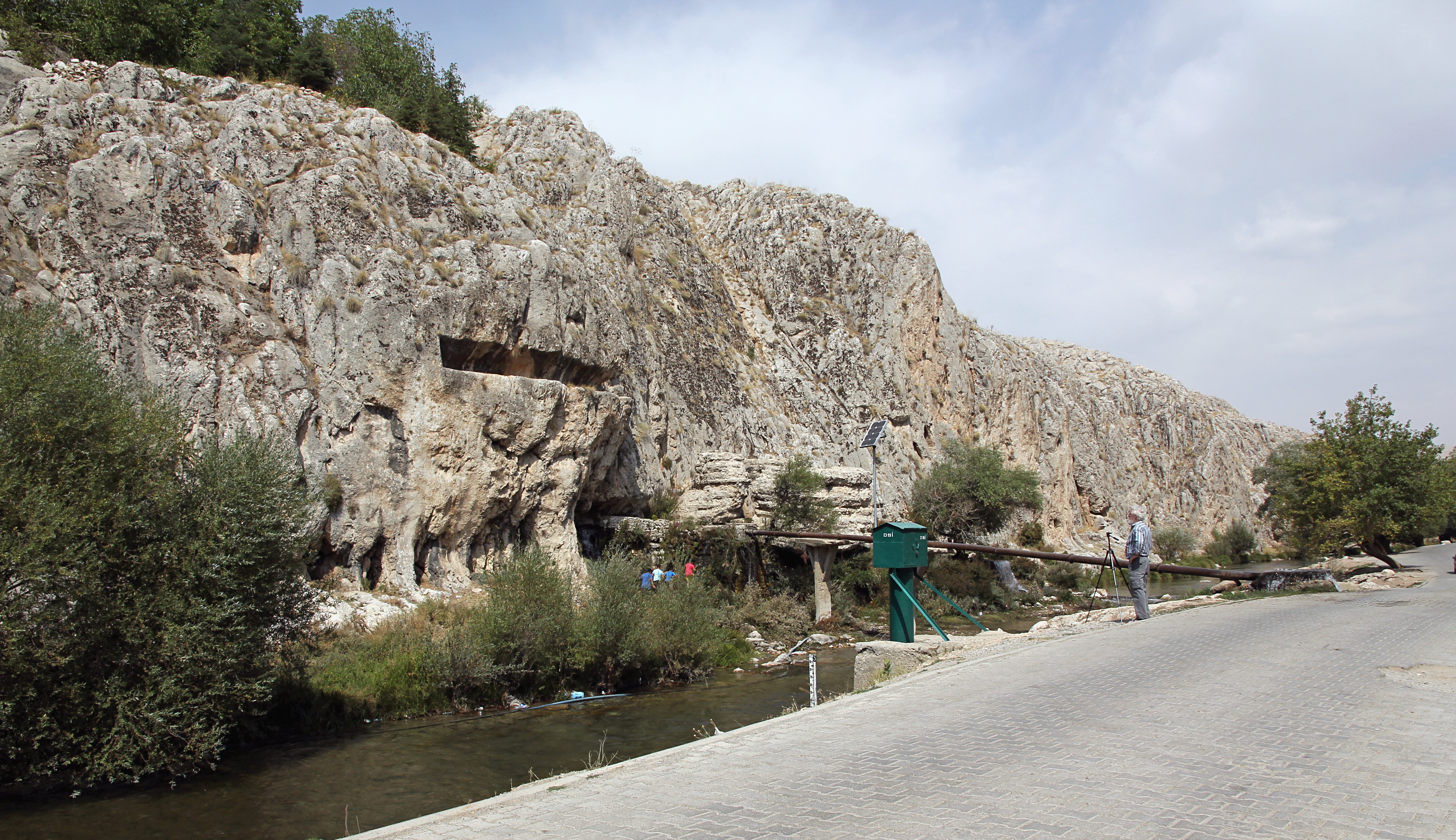 Hieroglyphen-luwische Felsinschrift in Tanır am Fluss Hurman, Südtürkei